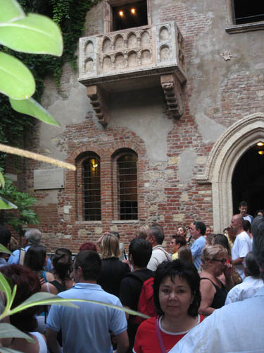 Туристы у балкона дома Джульетты